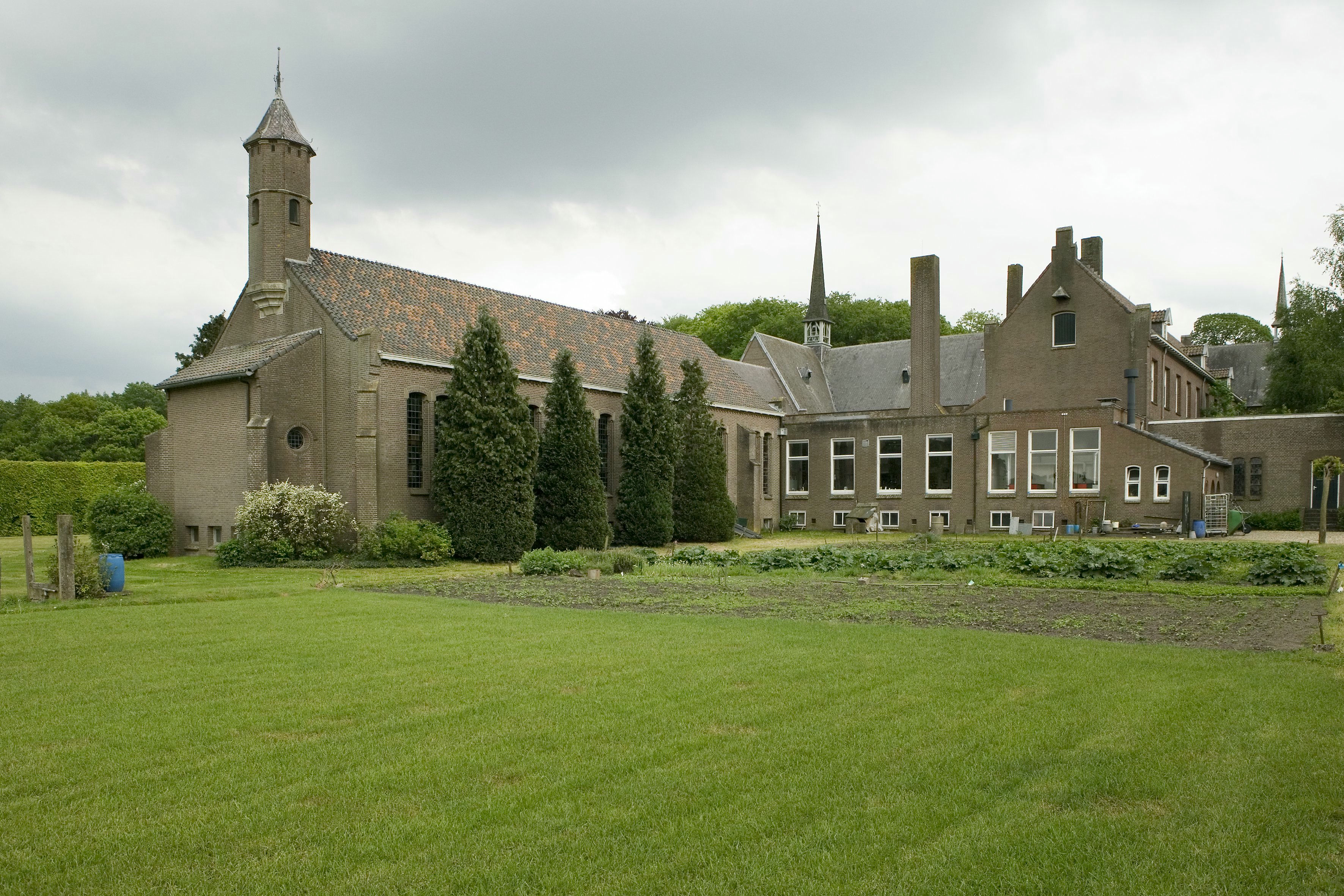 Abdij Sion: Overzicht achterzijde van het kloostercomplex